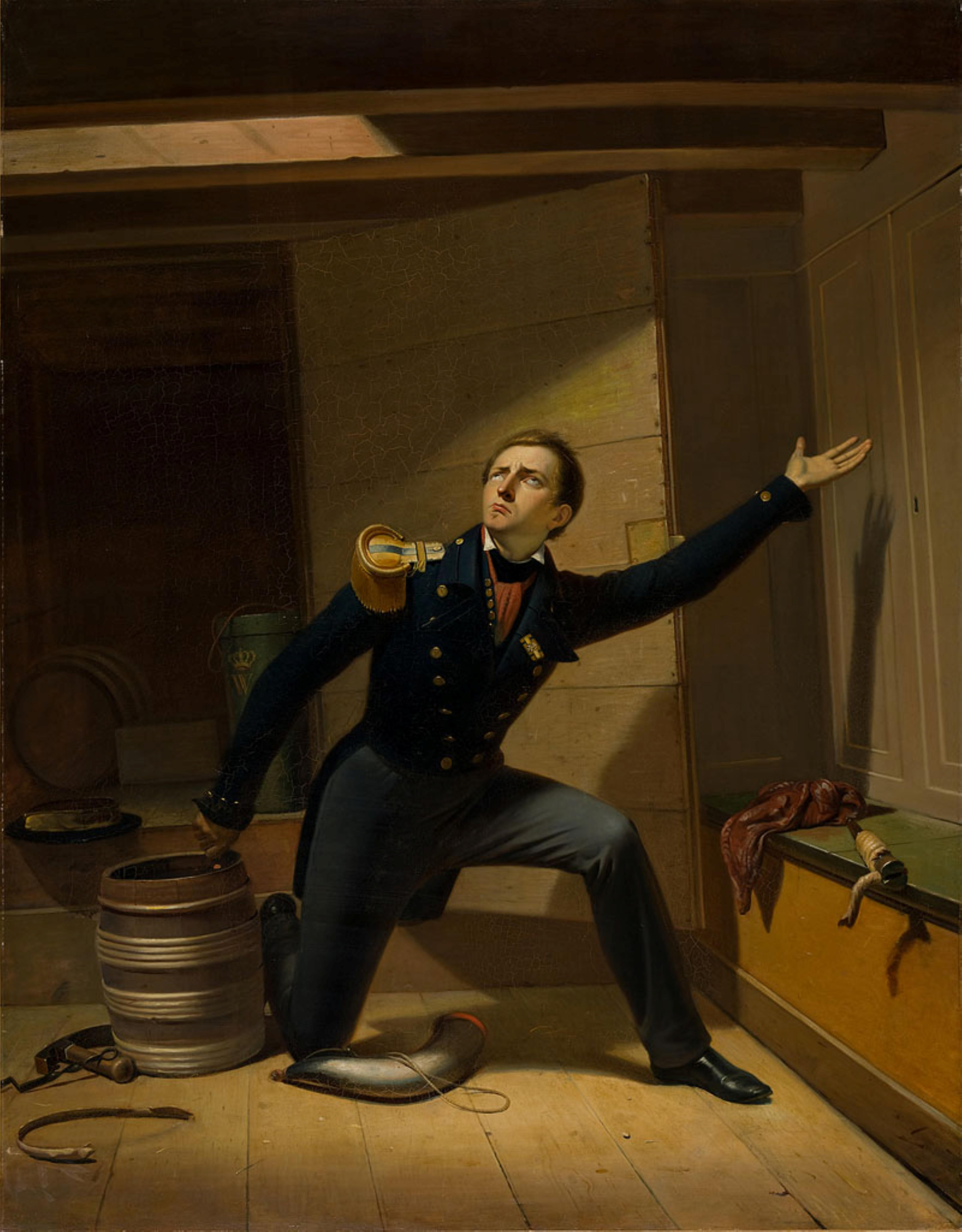 In 1830 brak in de Zuidelijke Nederlanden een opstand uit tegen het gezag van Koning Willem I. Deze zogenaamde Belgische Opstand, schiep een nationale held aan Nederlandse zijde, namelijk J.C.J. van Speijk, ex-burgerwees en luitenant ter zee. Op de vroege morgen van 5 februari 1831 stak hij, voor de rede van Antwerpen de lont in het kruitvat van zijn kanonneerboot, toen Belgische opstandelingen aan boord kwamen en de Nederlandse driekleur dreigden te strijken. De heldendood van Van Speijk had in het noorden een geweldige Van Speijk-cultus tot gevolg.